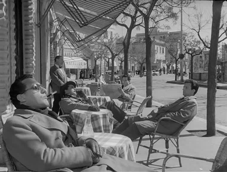 Screenshot del film I vitelloni (1953)